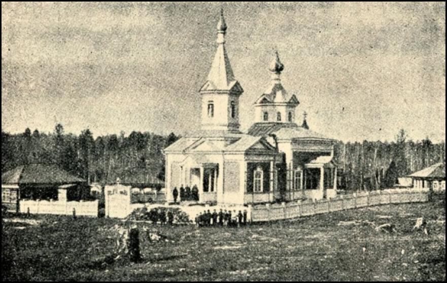 Церковь в посёлке Унарском Егоровской волости Тарского уезда. 1916 год